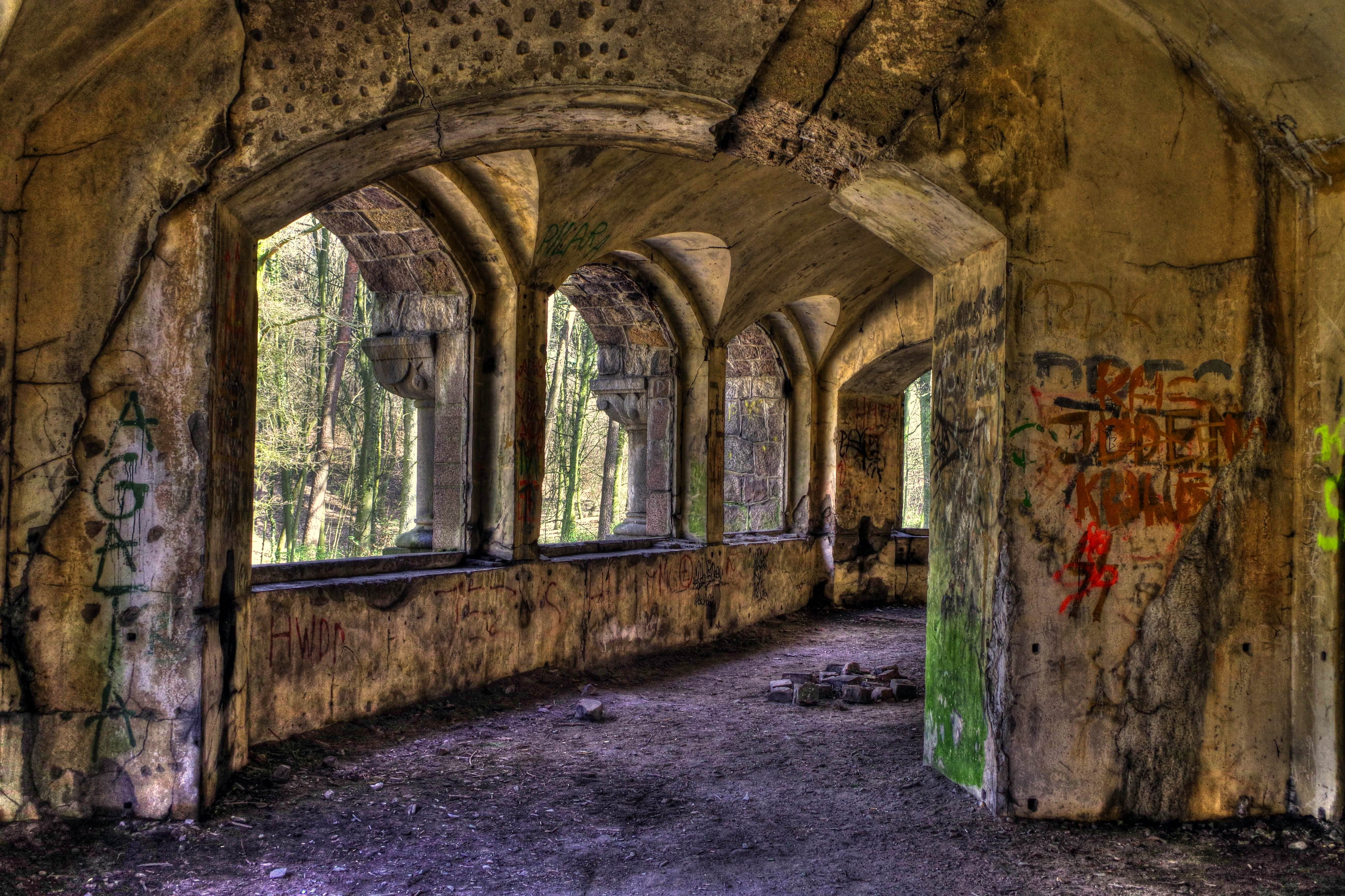 Wieża Quistorpa, Szczecin